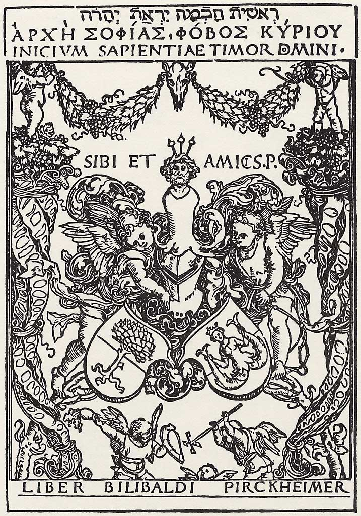 Entstehungsjahr: um 1501 Maße: 17,1 × 11,8 cm Technik: Holzschnitt, Aufbewahrungsort: Coburg, Sammlung: Kunstsammlungen der Veste Coburg, Epoche: Renaissance, Land: Deutschland, SIBI ET AMICIS Ihm selbst und seinen Freunden